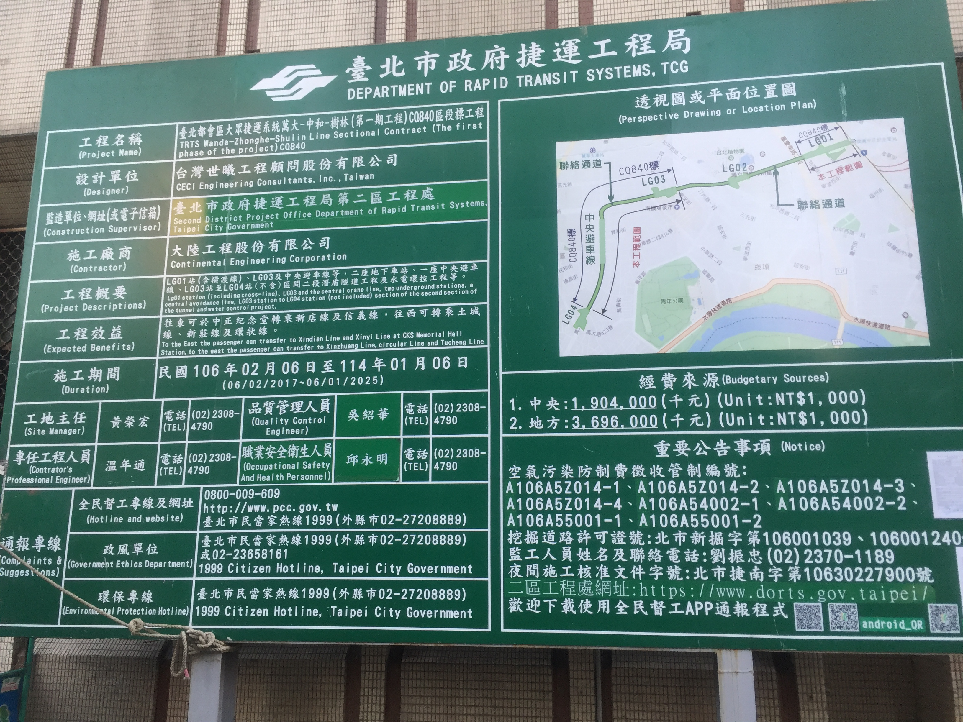 臺北市中正區羅斯福路一段，臺北都會區大眾捷運系統萬大－中和－樹林線第一期工程CQ840區段標工程告示牌，臺北市政府捷運工程局建置。